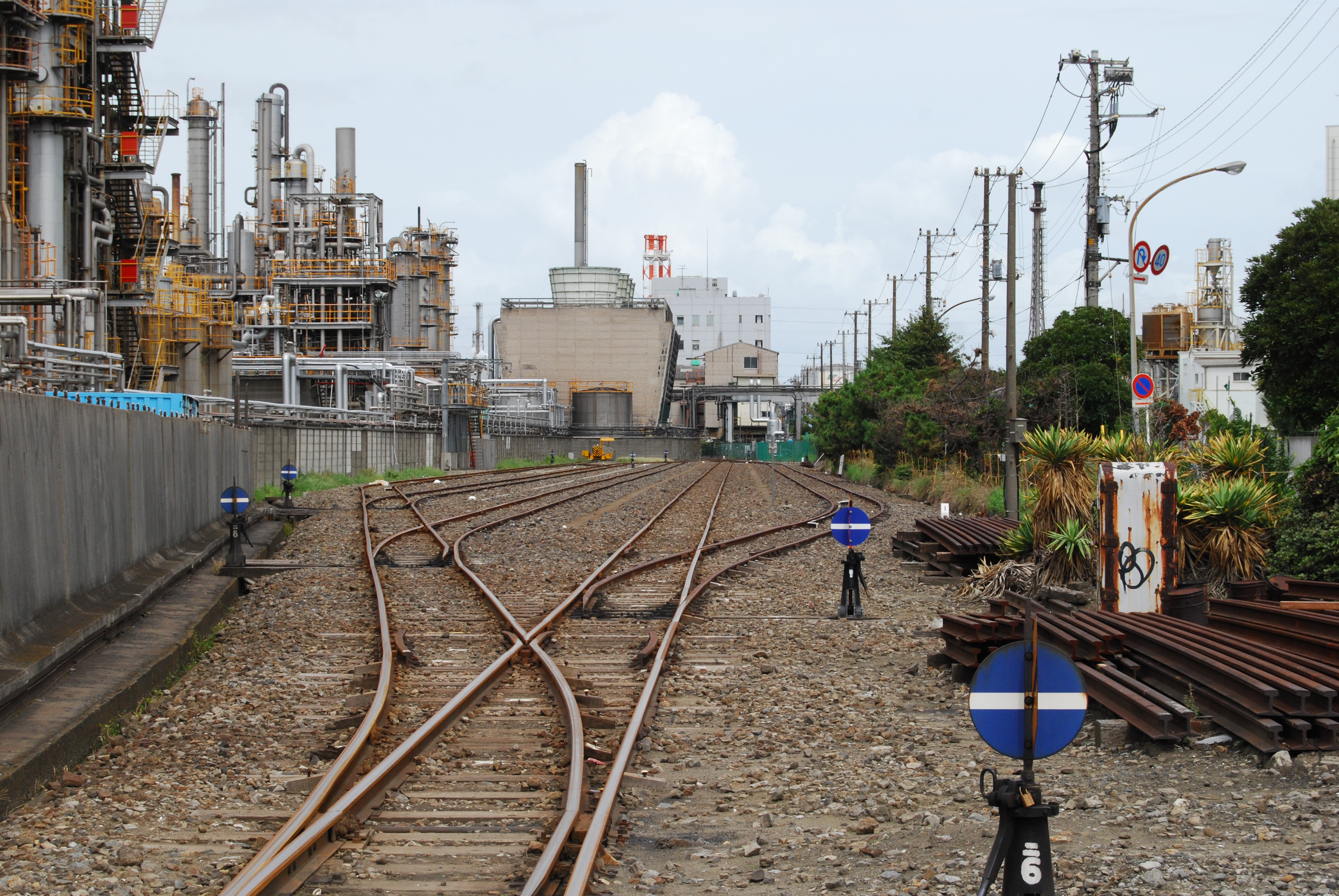 川崎臨海鉄道千鳥線、千鳥町駅（踏切から撮影）